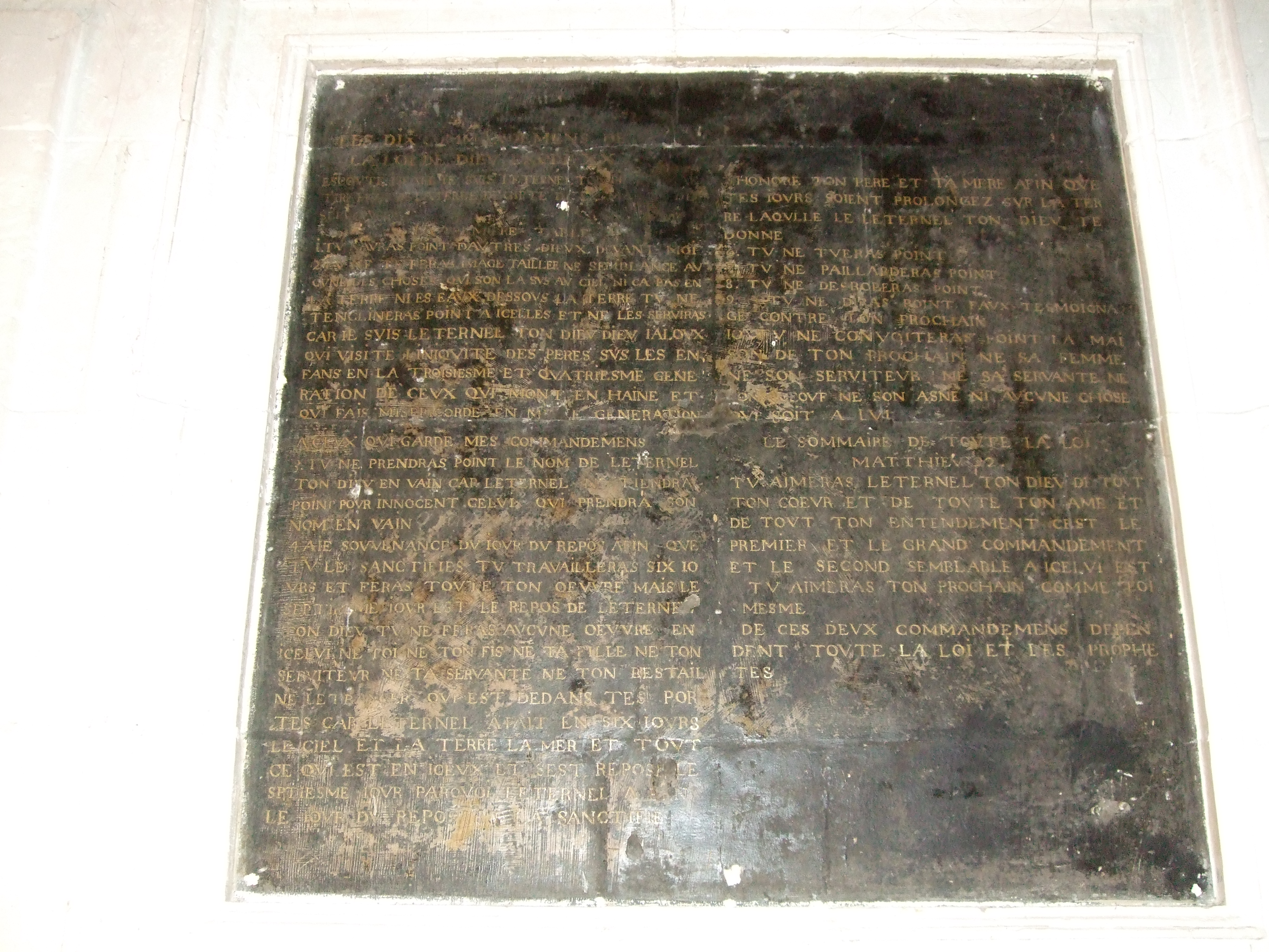 Décalogue protestant du fief de La Mabilière